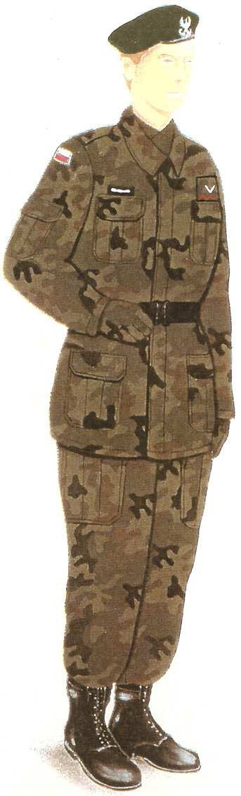 Mundury ZS "Strzelec" OSW: Ubiór polowy zimowy. 1999